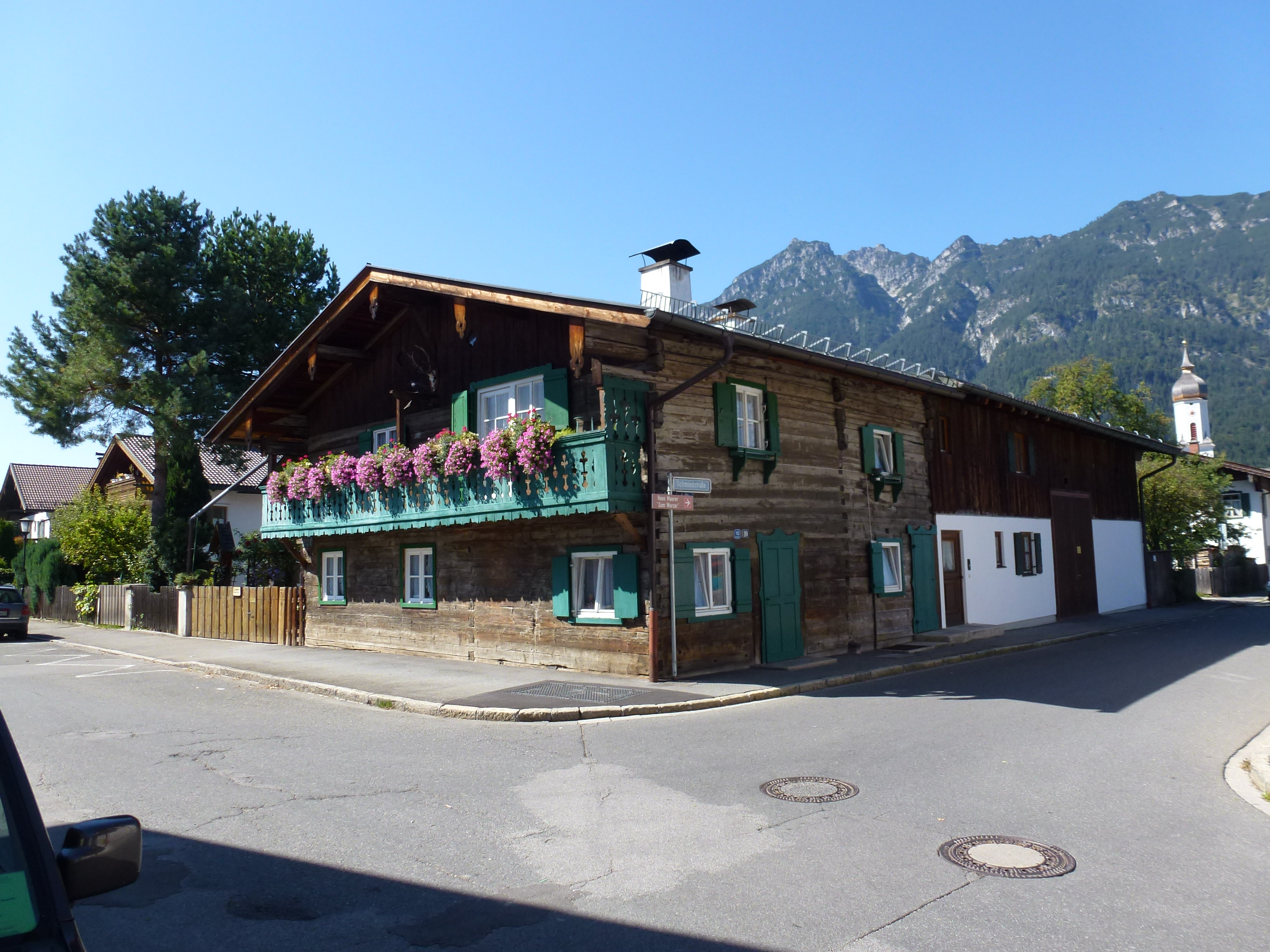 Bauernhaus - Schmiedstraße 10, Garmisch-Partenkirchen